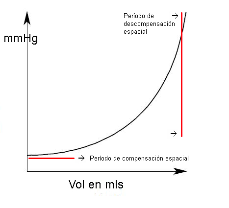 Generalization of changes in intracranial pressure.